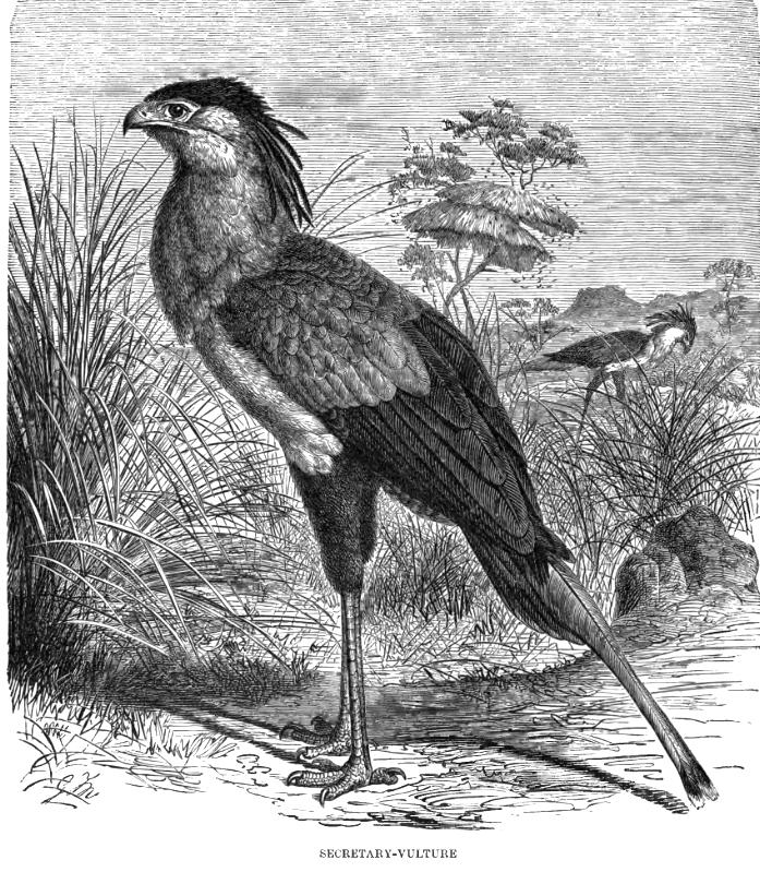 Secretary Bird Sagittarius serpentarius